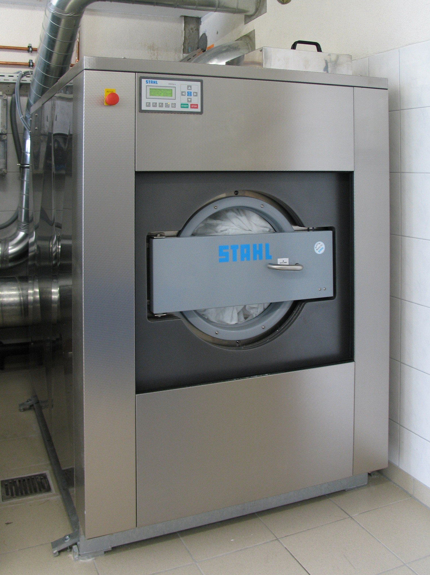 * Beschreibung: Gewerbewaschmaschine für ca 60kg Schmutzwäsche * Quelle: selbst aufgenommen * Fotograf: CrazyD, 19. April 2006 * Lizenzstatus: GNU FDL * Description: Large washing machine * Source: photo was taken by my self * Photographer: CrazyD, 14th April 2006 * Licence: GNU FDL